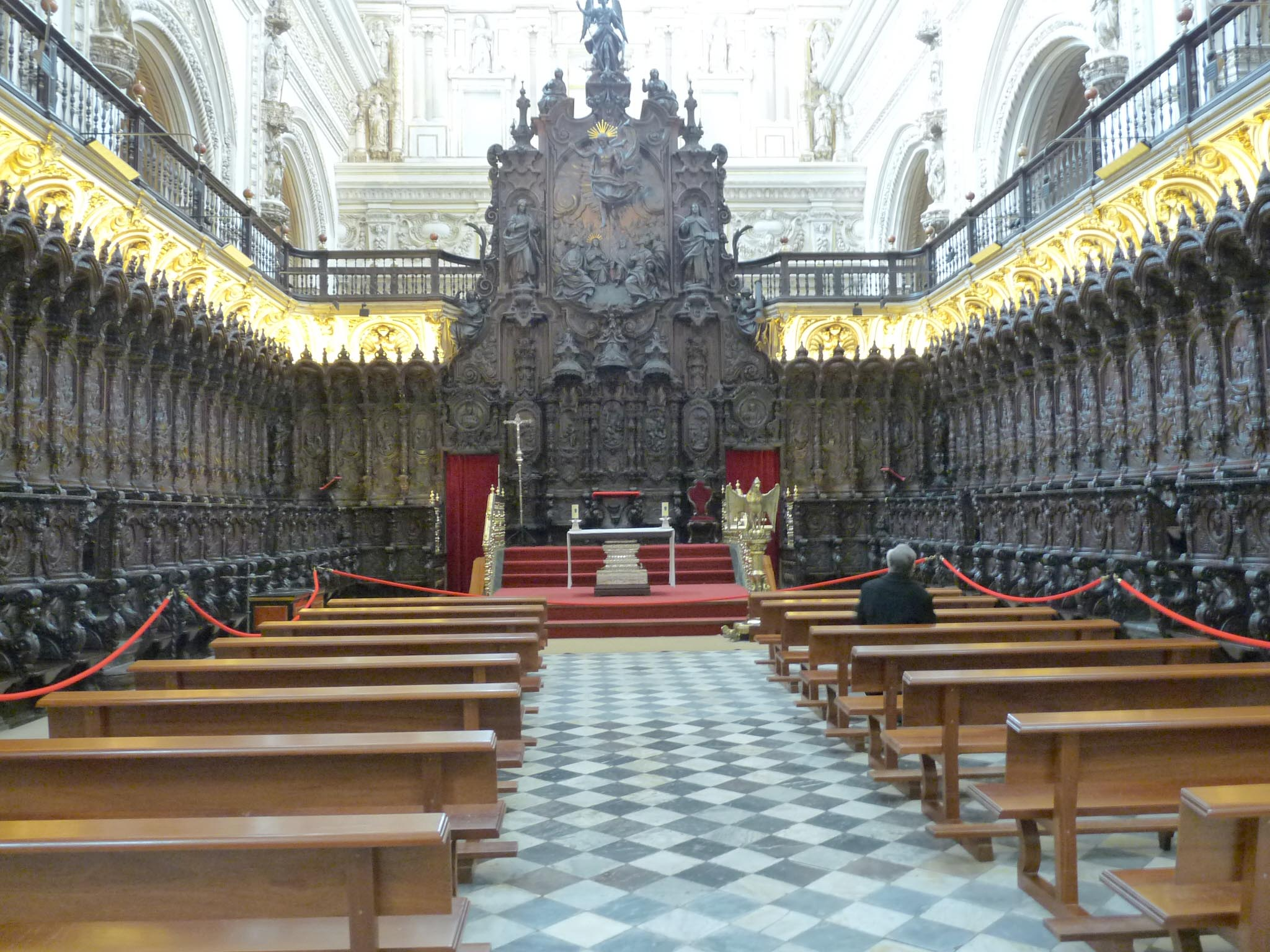 Capilla Mayor de la Mezquita de Córdoba (España).